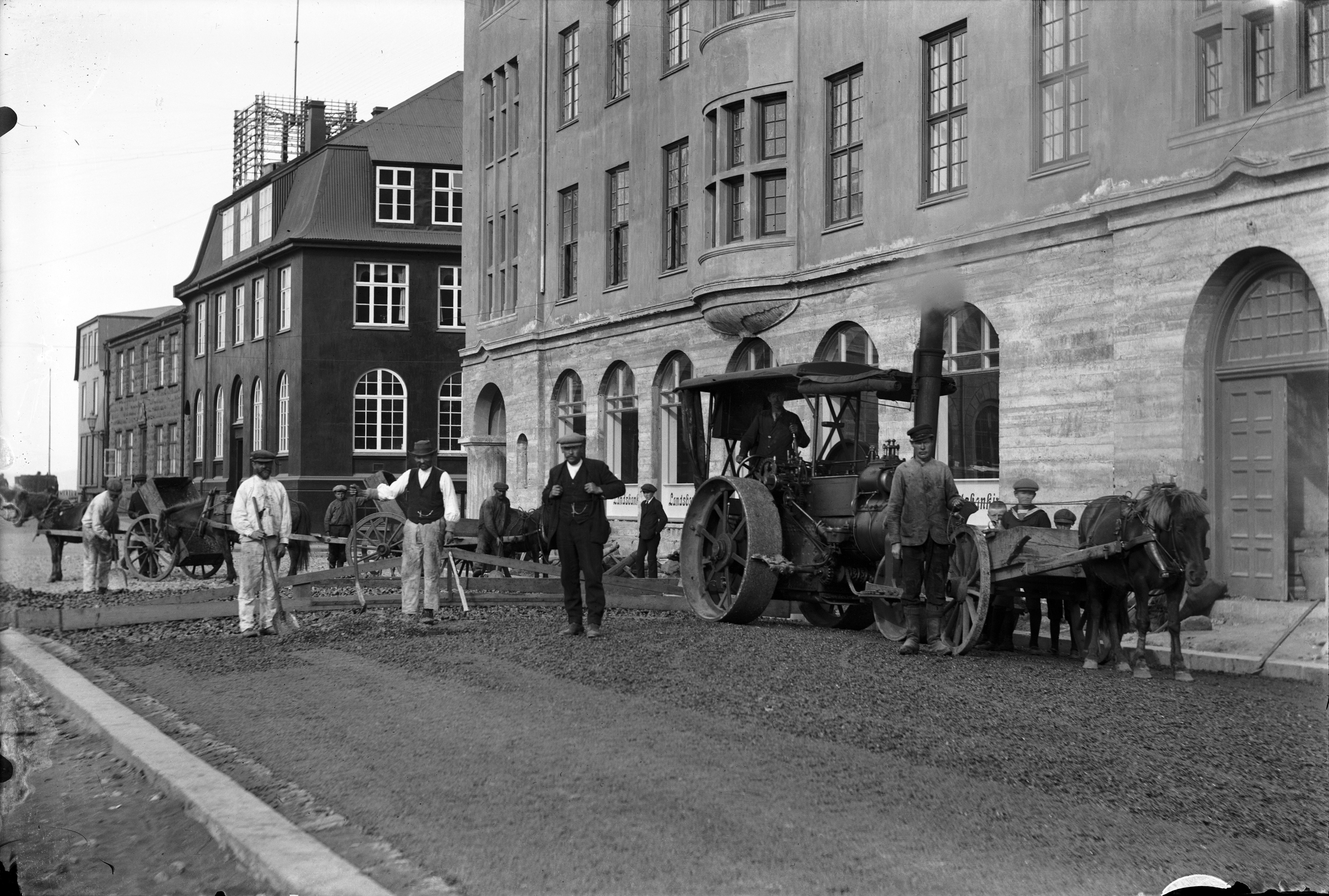 Haust 1917, verkamenn tjörusteypa Pósthússtræti en hestar, teymdir áfram af unglingspiltum, draga að þungann grjótmulninginn. Gufuvaltarinn "Bríeti Knútsdóttir" sér aftur á móti um að þjappa jarðefninu saman en valtarinn dregur nafn sitt af tveimur kröftugum bæjarbúum, Bríeti Bjarnhéðinsdóttur og Knut Zimsen. Til hægri sést stórhýsi Nathans&Olsen, Austurstræti 16 sem fullbyggt var þetta ár og ef vel er að gáð sjást stafir Landsbanka Íslands í gluggunum á neðstu hæðinni, en þar var afgreiðsla bankans þar til endurbyggingu Landsbankahússins var lokið vorið 1924. Fjær er pósthúsið, Pósthússtræti 5 og gamli barnaskólinn við Pósthússtræti, Pósthússtræti 3. *** Local Caption *** Gatnagerð í Pósthússtræti. Verkamenn leggja mulning. Hestvagnar og gufuvaltarinn Bríet. Austurstræti 16, Pósthús. Catalag id: MAÓ 115